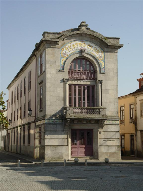 Esposende Museum Portugal